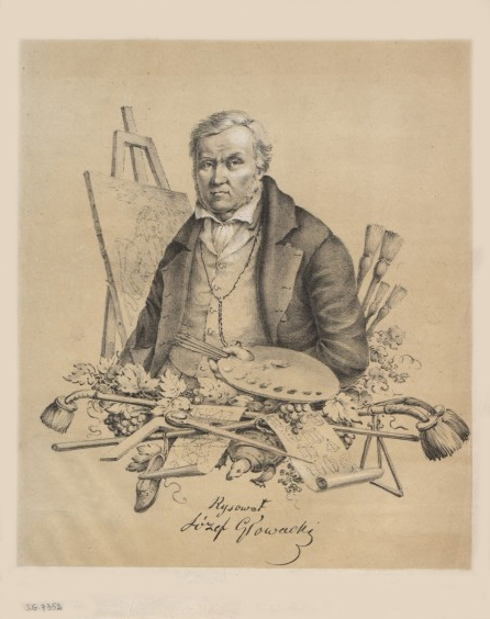 Self-portrait